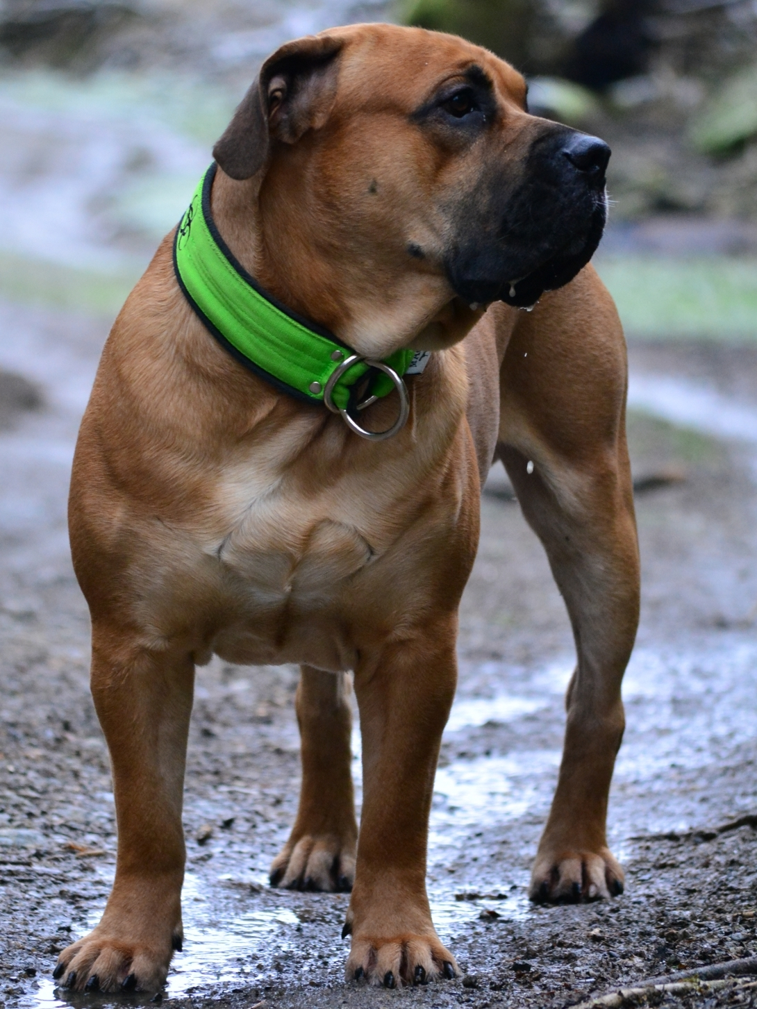 jeune dogue de majorque fauve à masque noir